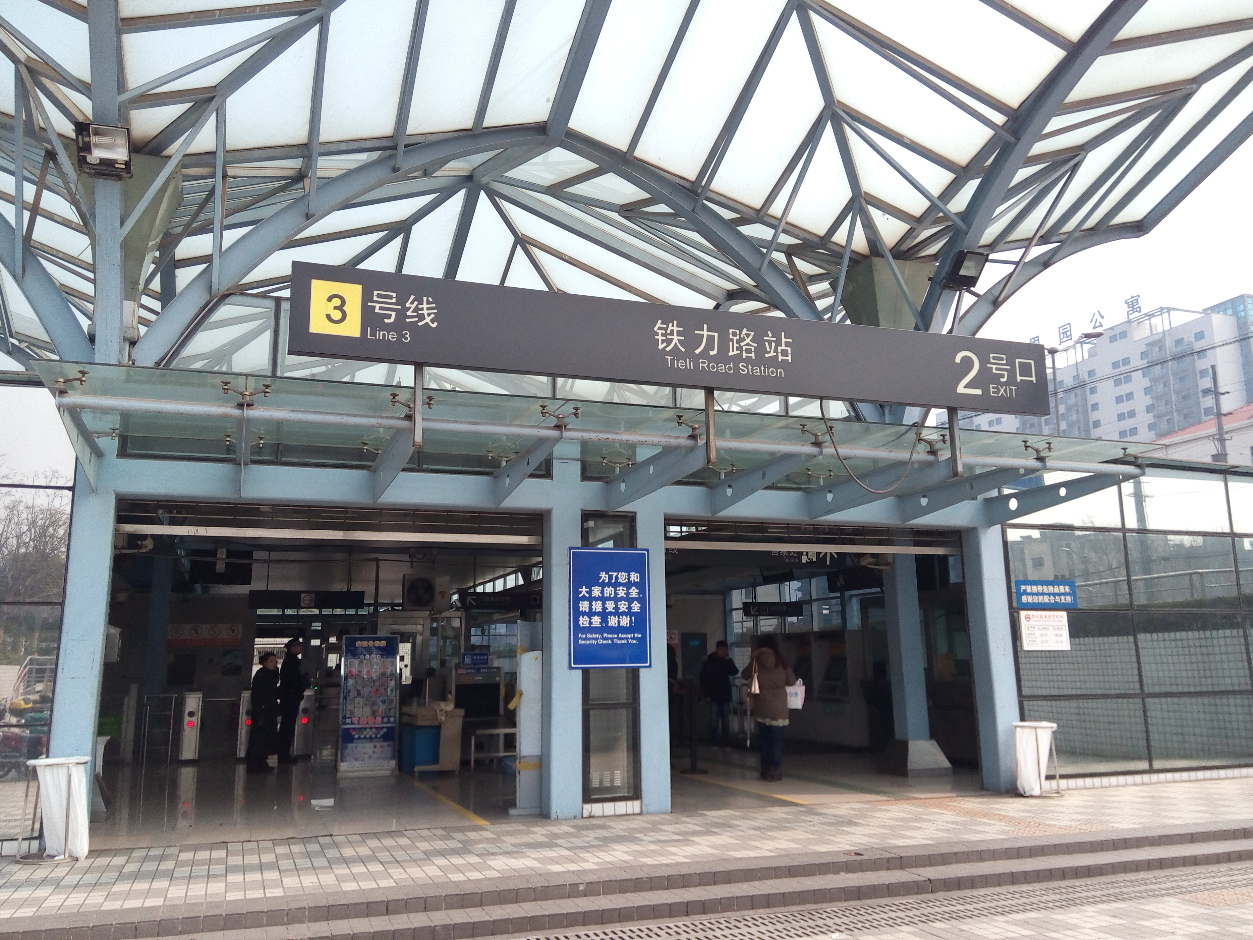 铁力路站。